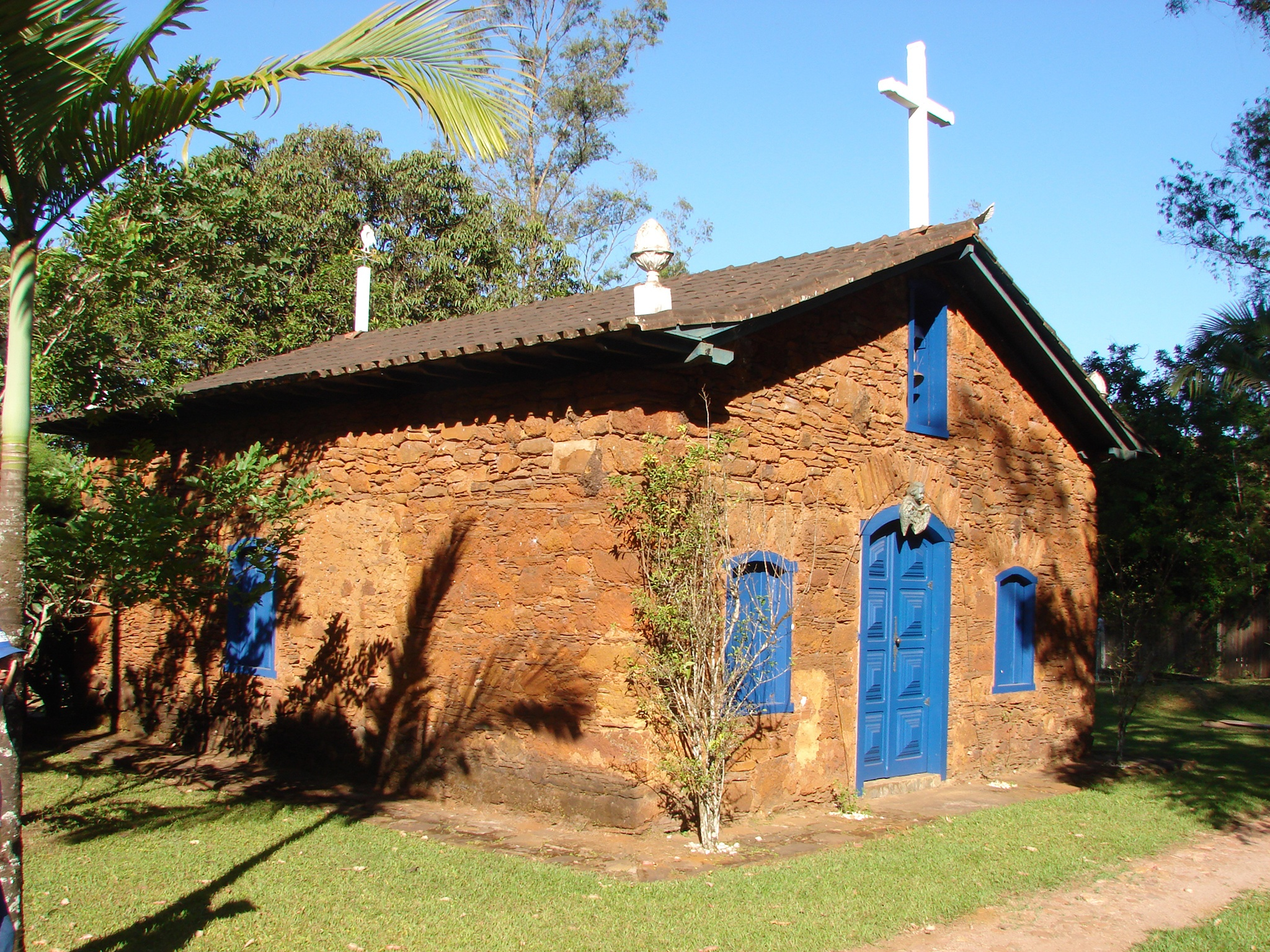 Igreja feita com hematita, toda restaurada - Mina de Gongo Soco